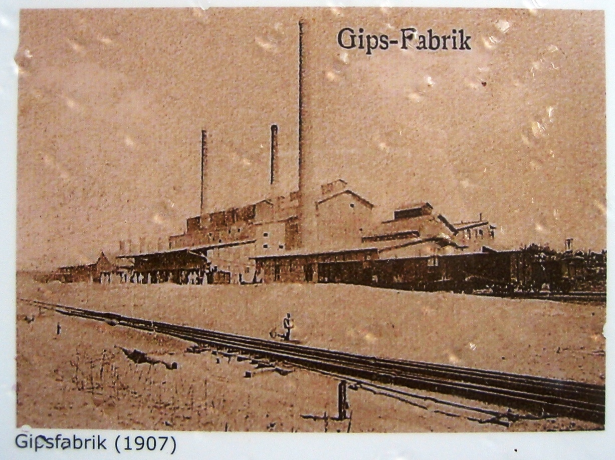 Gipsfabrik in Sperenberg im Jahr 1907, heute ein Ortsteil der Gemeinde Am Mellensee, Landkreis Teltow-Fläming, Brandenburg. Aufnahme von einer öffentlich zugänglichen Informationstafel des „Boden-Geo-Pfads“ in Sperenberg.